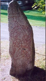 Upplands runinskrifter 1011, höger sida